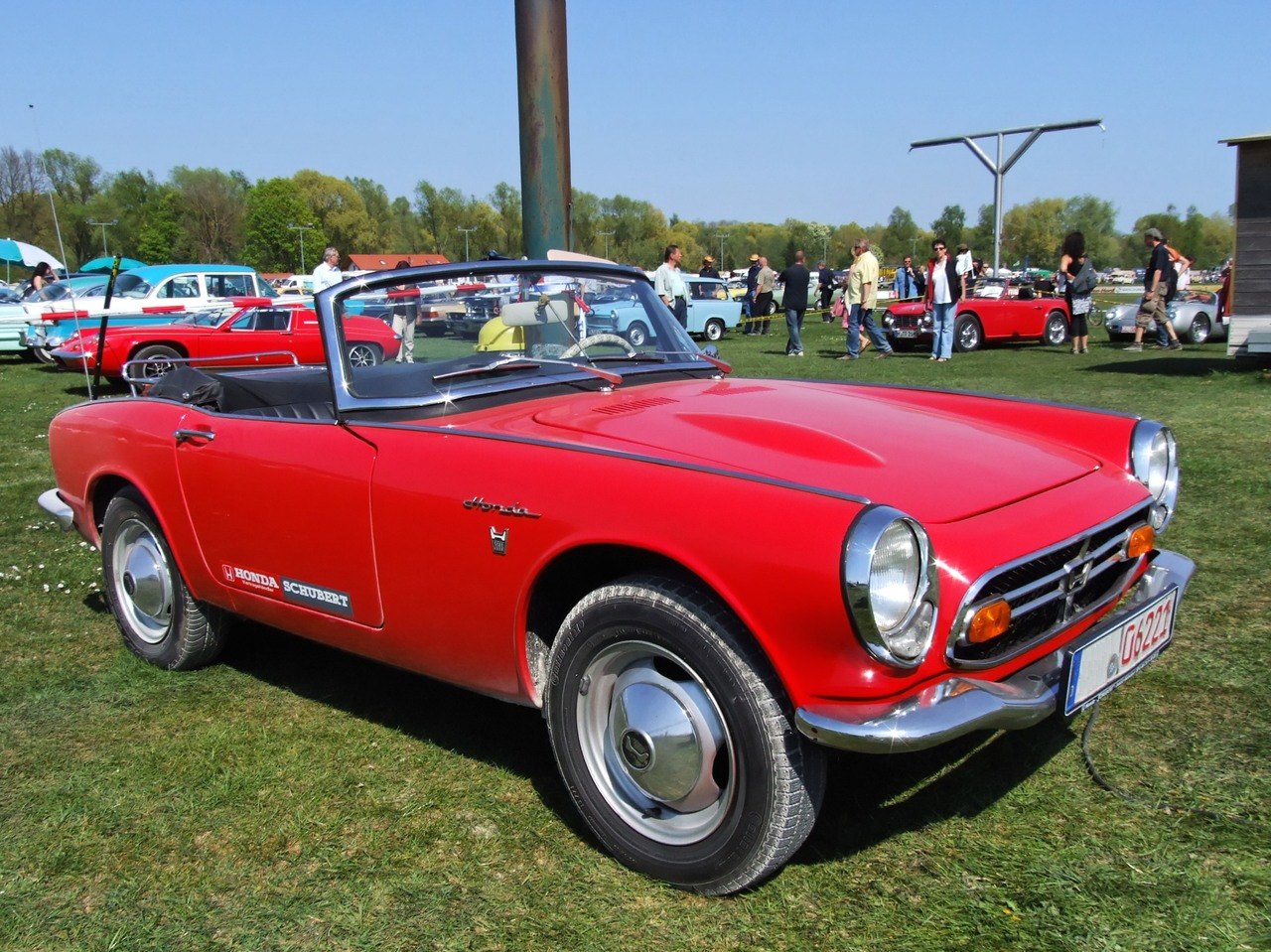 Honda S 800